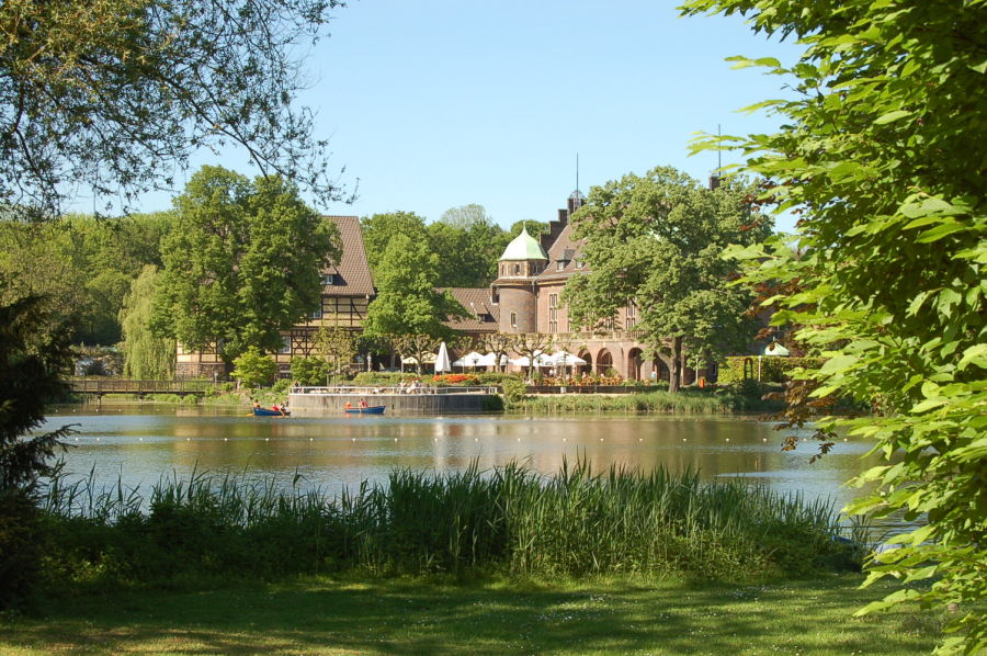 Haus Wittringen in Gladbeck